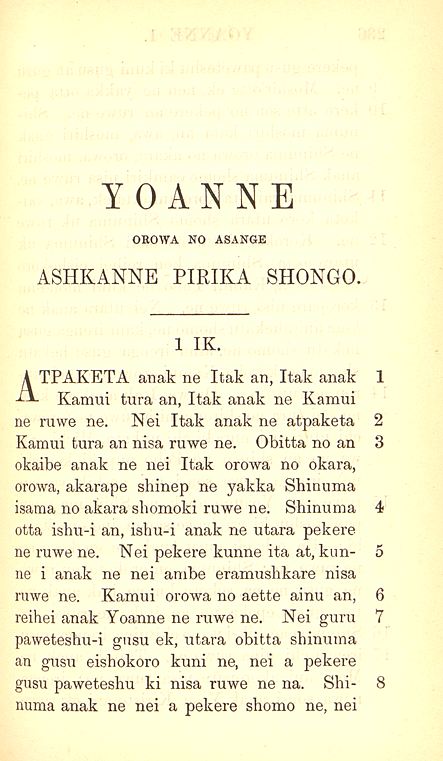 Traduction en langue Aïnou de l'évangile selon Saint-Jean par le Révérend John Batchelor en 1891 ː page 1.